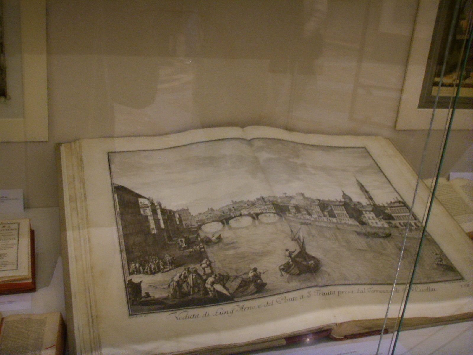 Veduta_di_firenze XVIII century